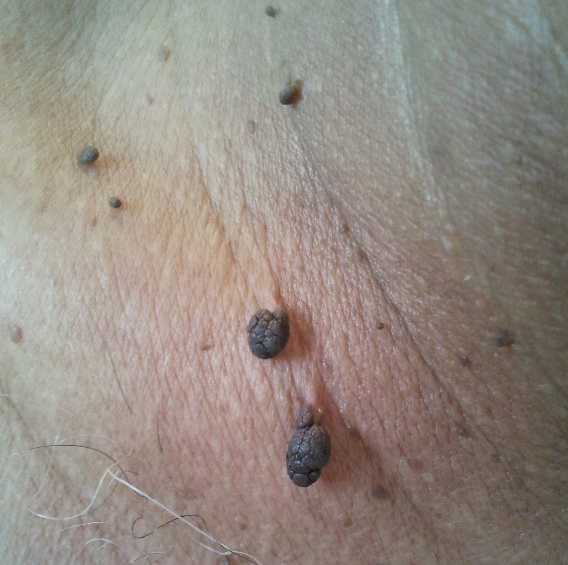 Molluscum pendulum (acrochordon) - au niveau cervical